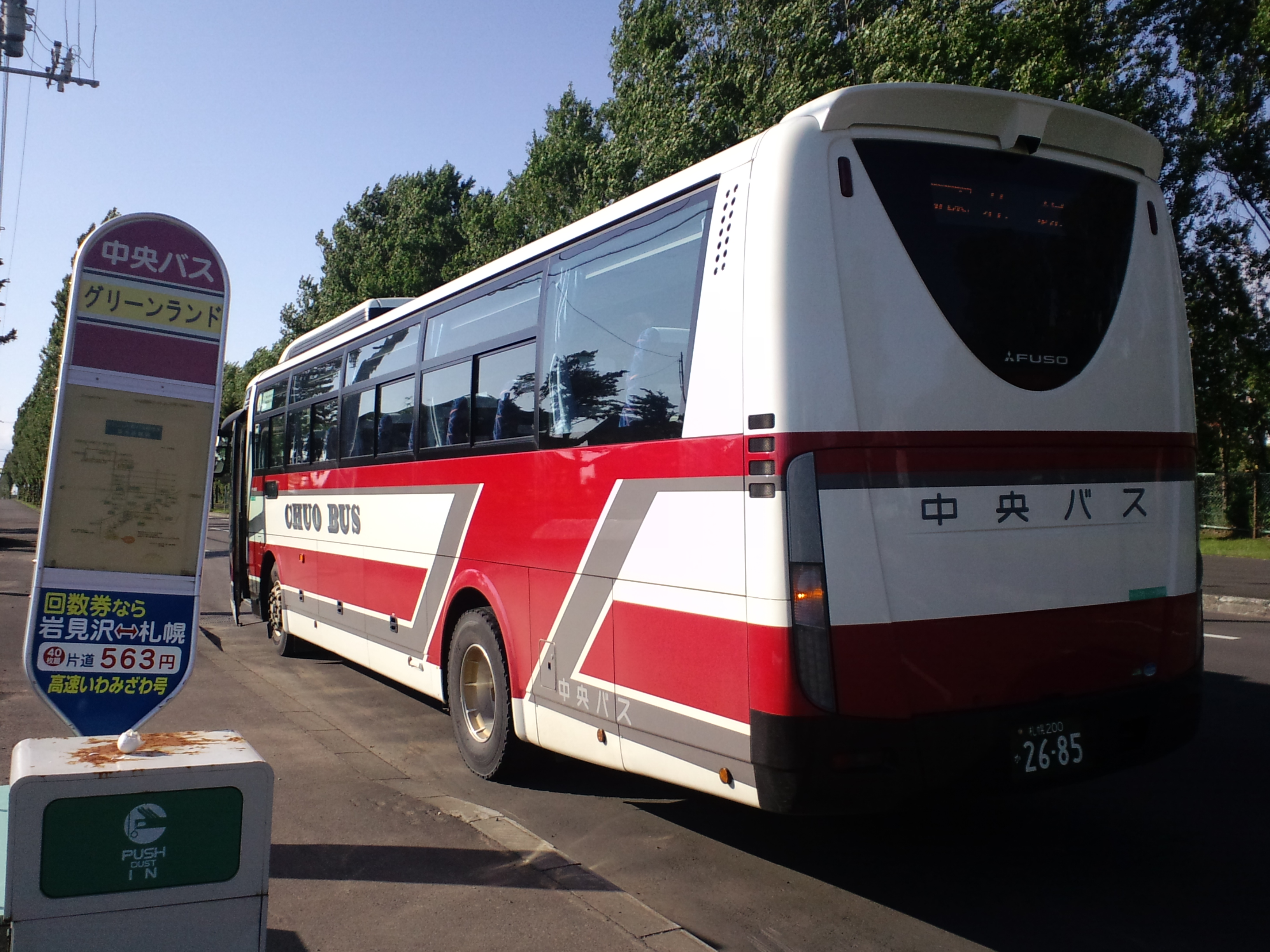 北海道中央バス・高速いわみざわ号グリーンランド発便